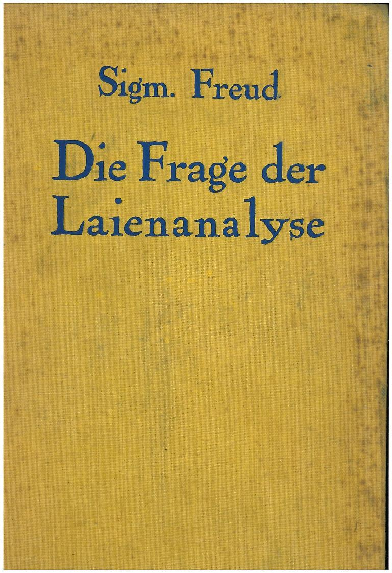 Cover of S. Freud, Die Frage der Laienanalyse